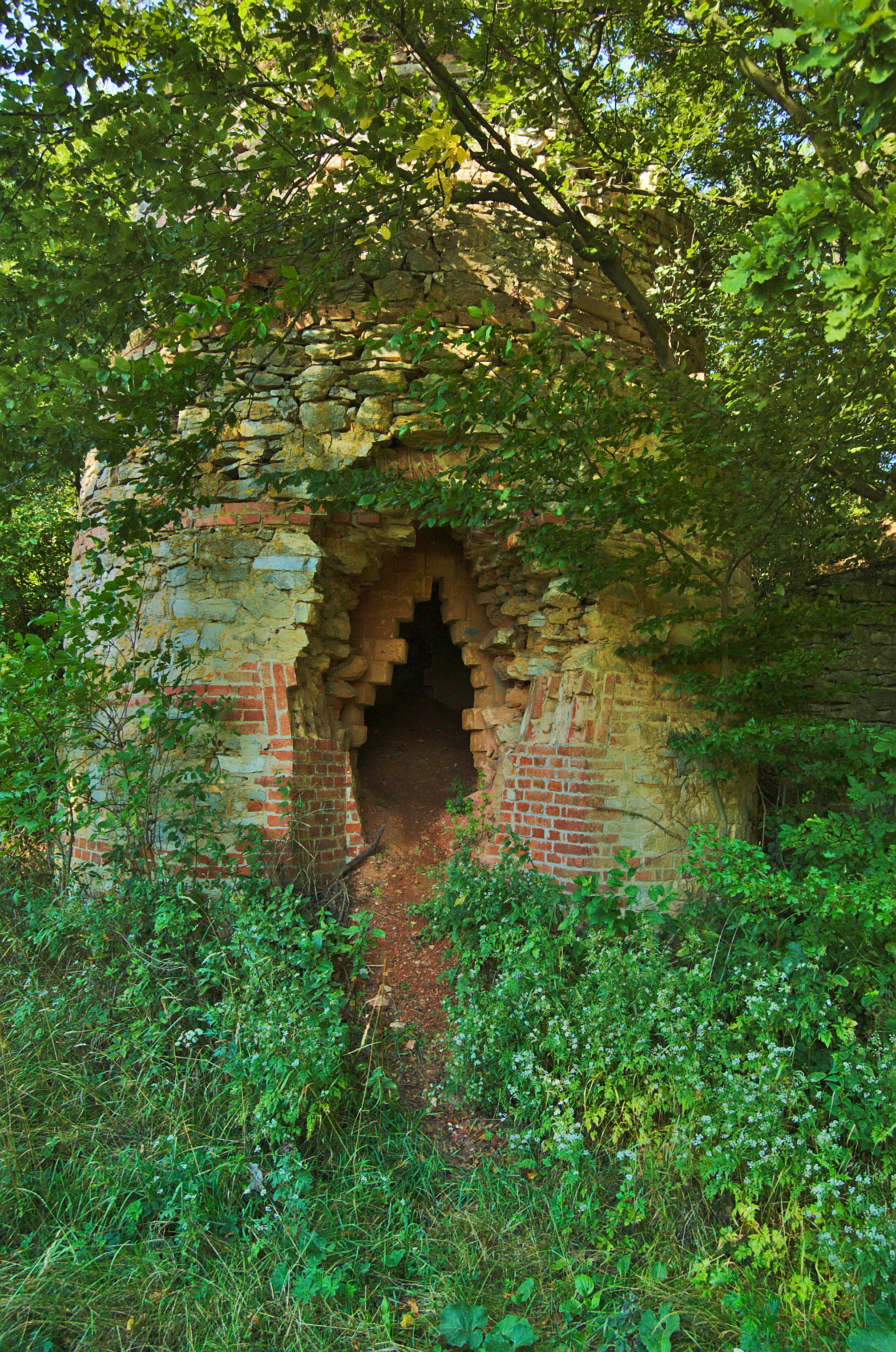 Jednoduchá kruhová šachtová vápenka, Kovářov, Bouzov, okres Olomouc